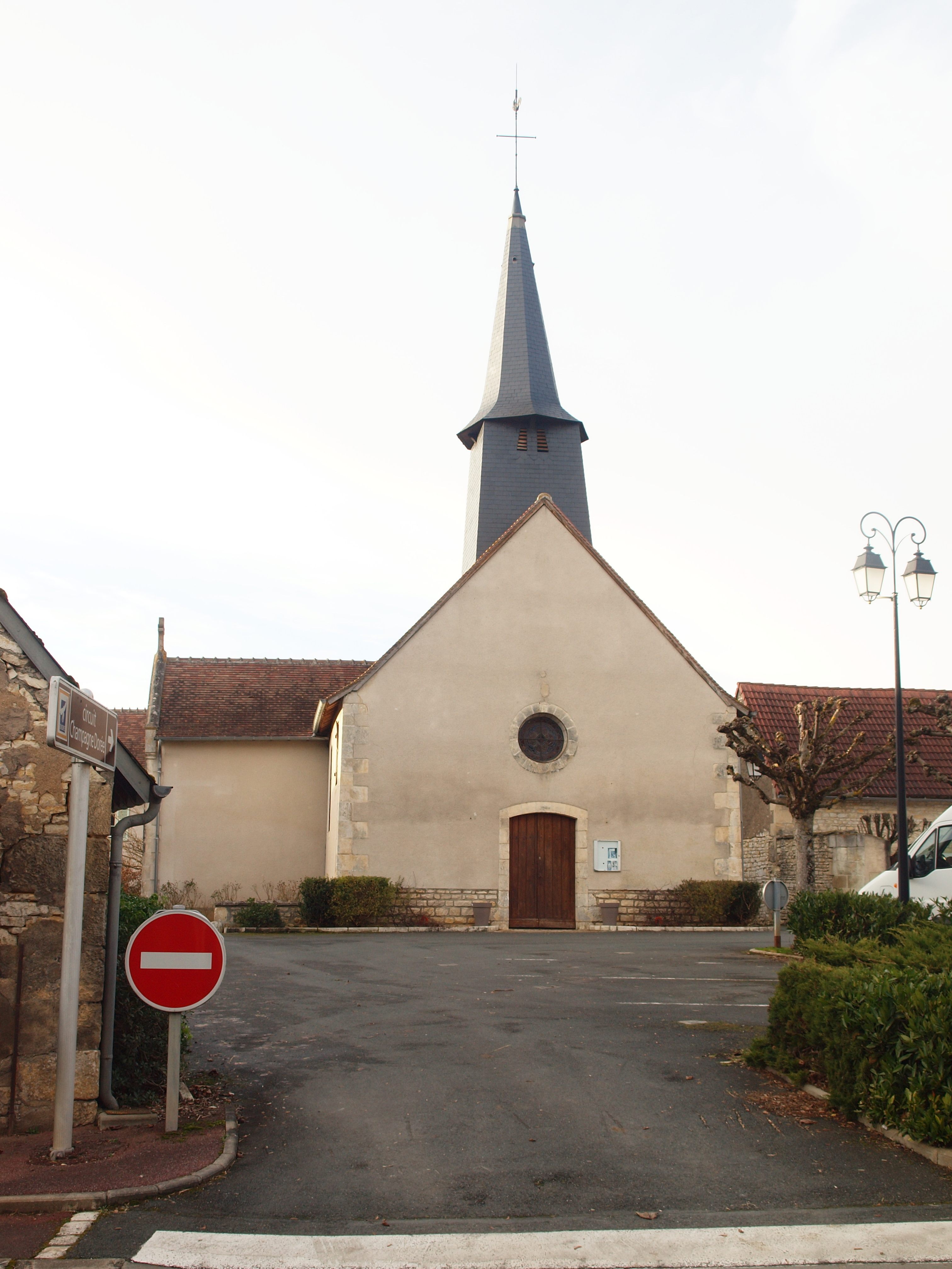 Meunet-Planches (Indre, France)